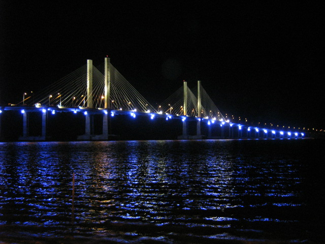 Ponte Aracaju Barra em Sergipe, Aracaju, Brasil